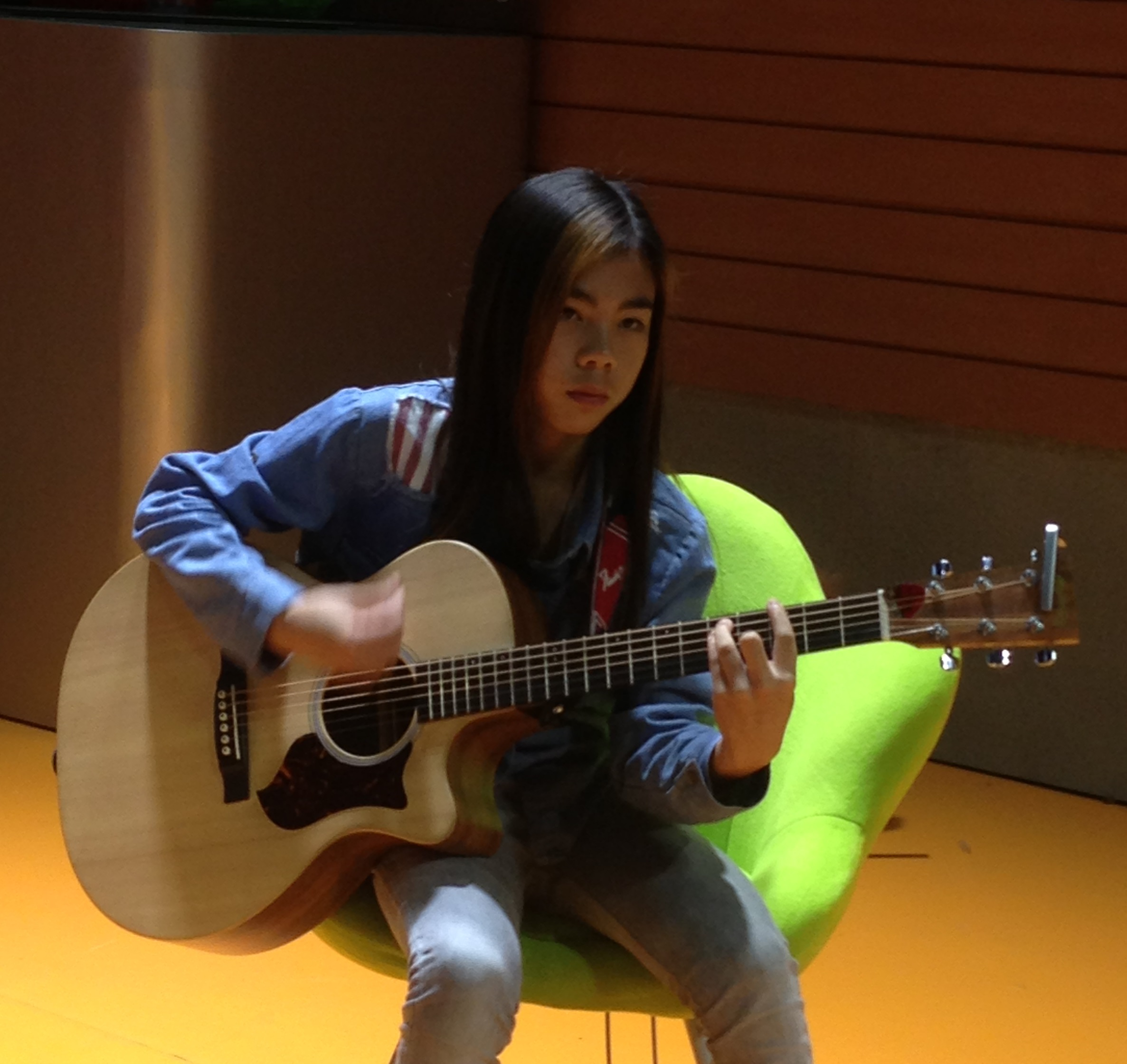 胡見宇2013年4月23日參加湖南衛視「中國新聲代」錄影，在後台準備中